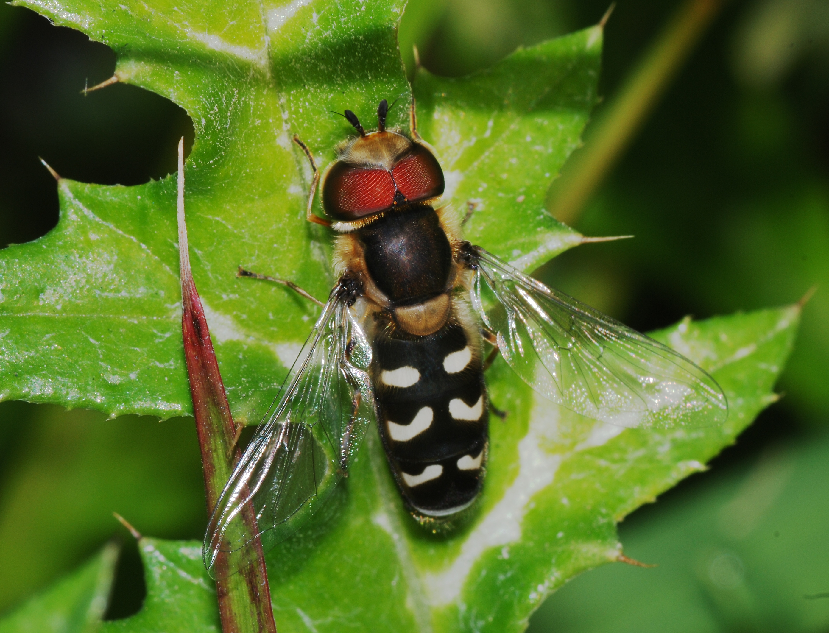 A male hoverfly (Scaeva pyrastri)